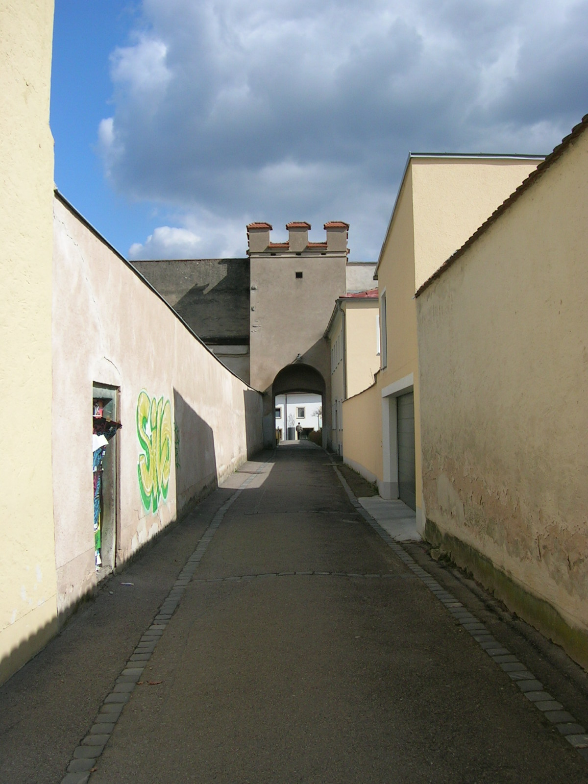 Wohlmuthgasse von Luitpoldstraße aus mit Stadtmauer und Turm.